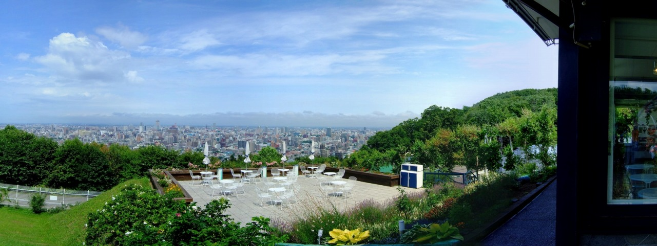 Chizaki rose garden